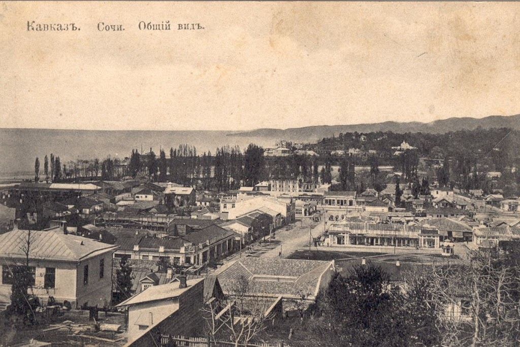 Общий вид Сочи (в настоящее время Центральный район) в начале Х1Х века.